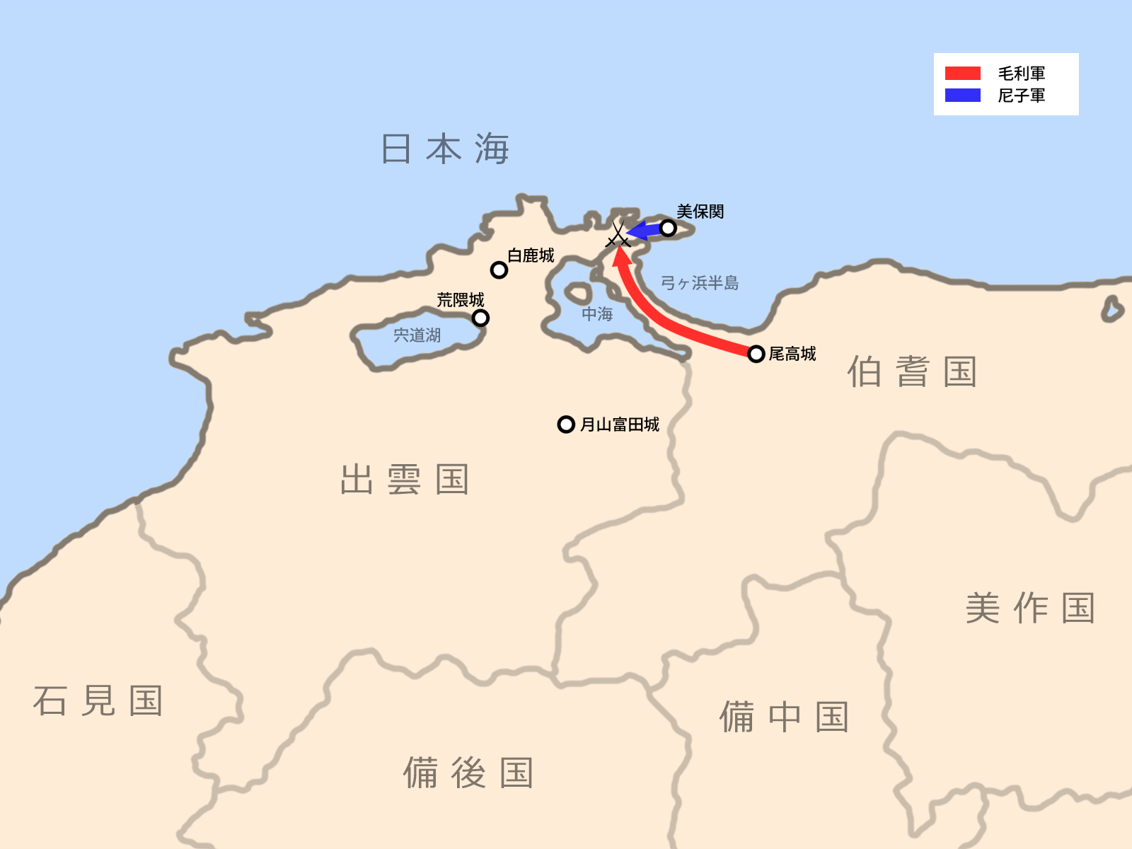 弓浜合戦に至る毛利軍・尼子軍の侵攻ルート。